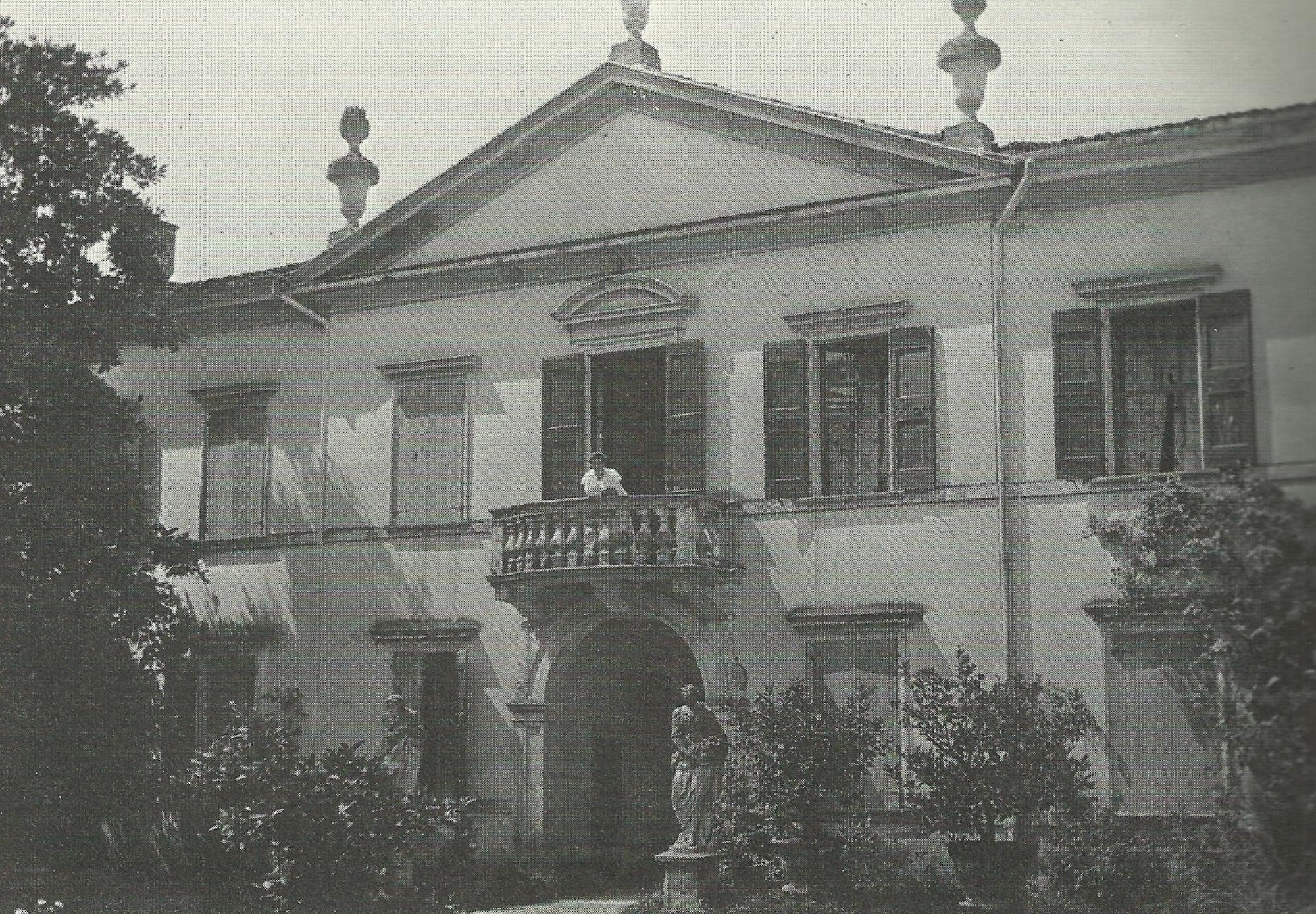 Facciata della villa Rotari Cartolari